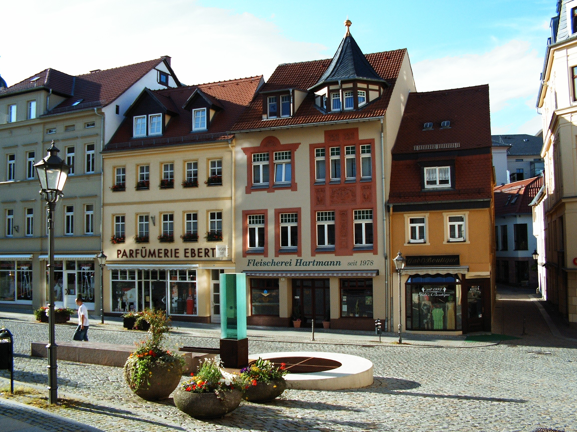 Kornmarkt Altenburg